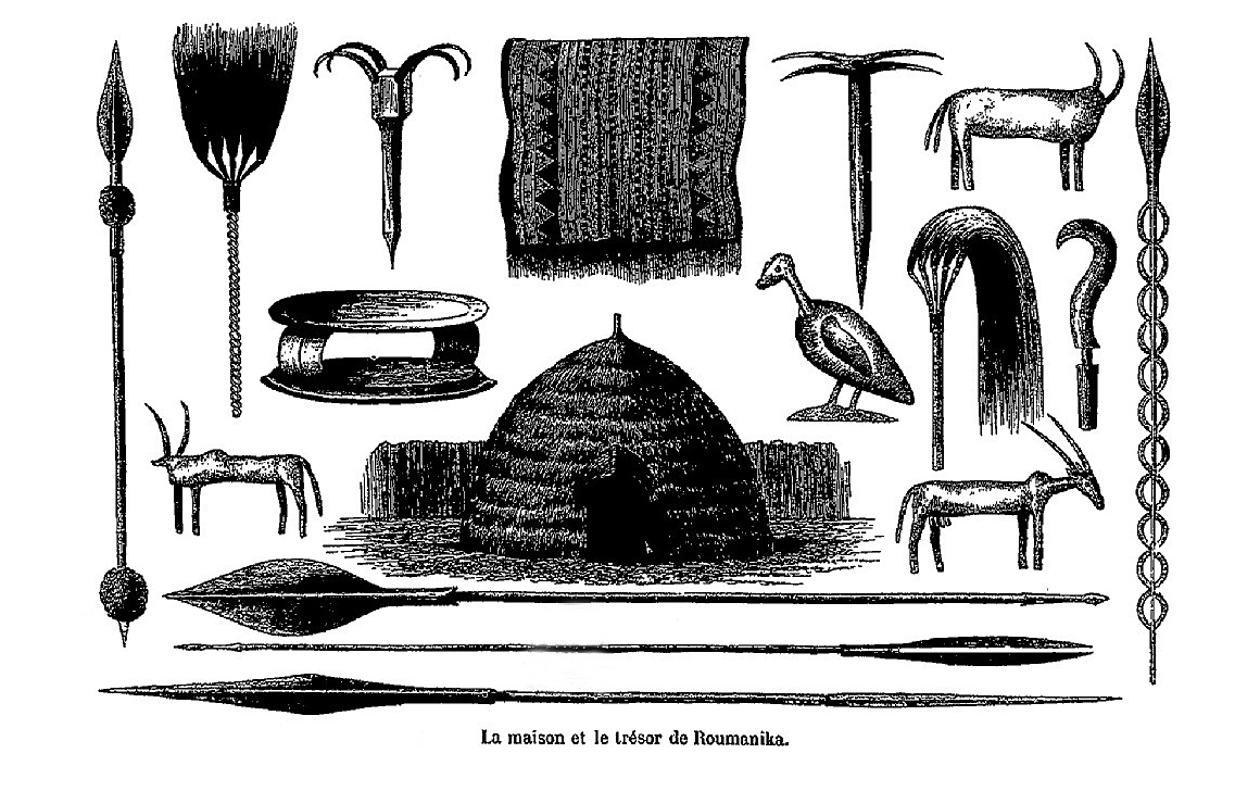 "La maison et le trésor de Roumanika", croquis par Henry Morton Stanley A travers le continent mystérieux : découverte des sources méridionales du Nil, circumnavigation du lac Victoria et du lac Tanganyka, 1879.